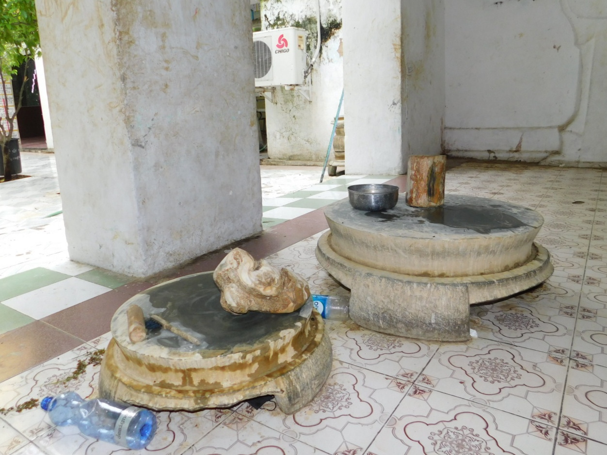 To apply thanaka at Kaunghmudaw pagoda